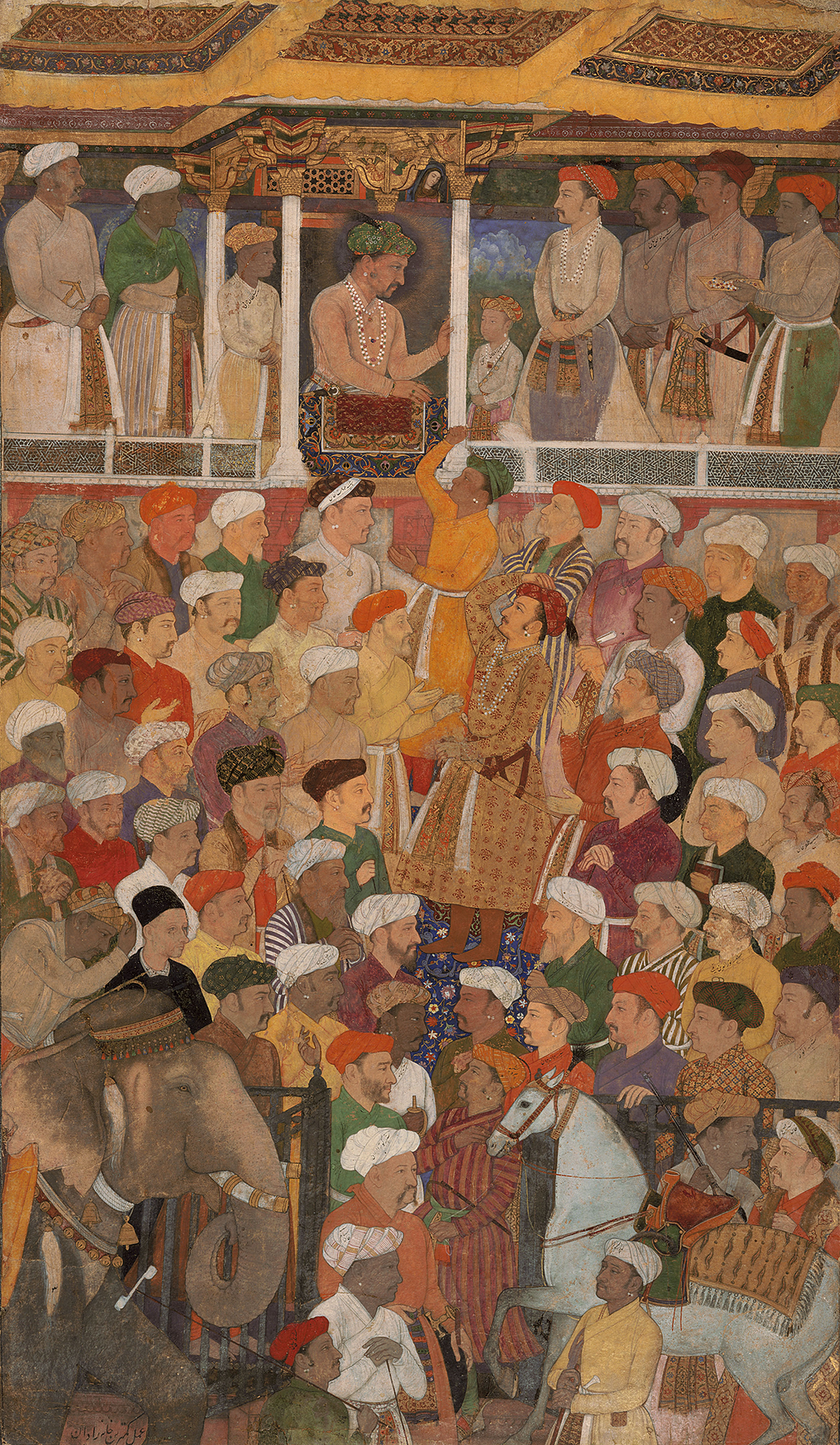 Jahangir's Darbar, from the Jahangir-nama, c1620